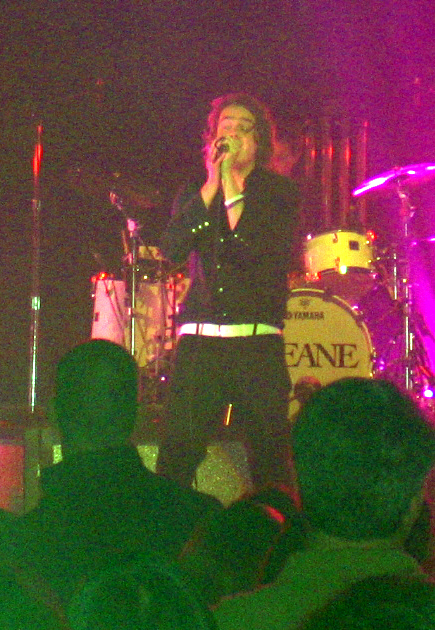 Photo d'origine Image:Keane concert modifiée pour montrer ce que donnerait une balance des blancs automatique avec un appareil numérique.